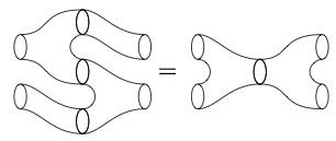 Frobenius algebra, Topologisk Kvantefeltteori: Frobenius relation